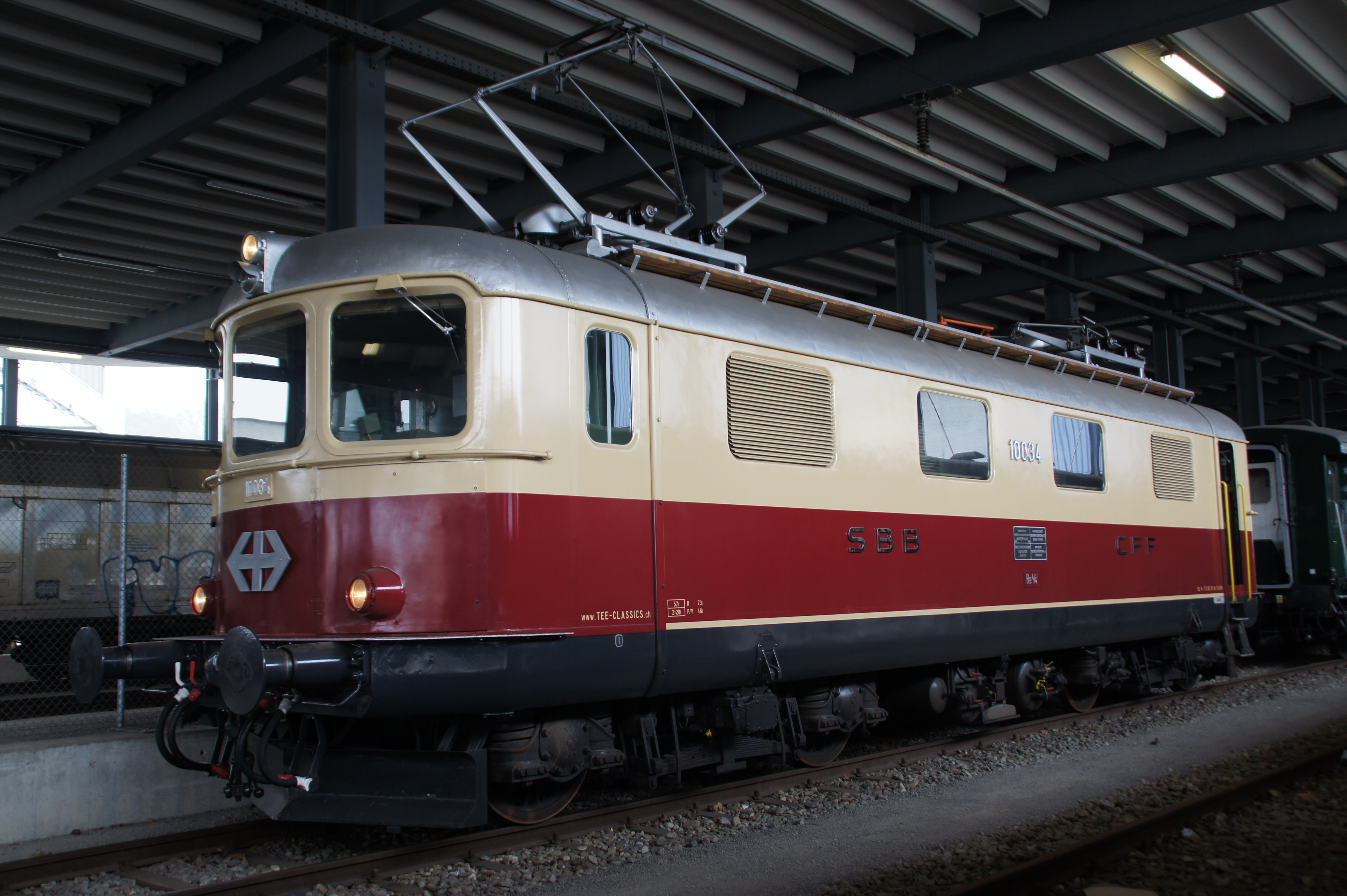 Dies ist eine der fahrtüchtig hergerichteten Re 4/4 I. Besitzerin TEE - Classics